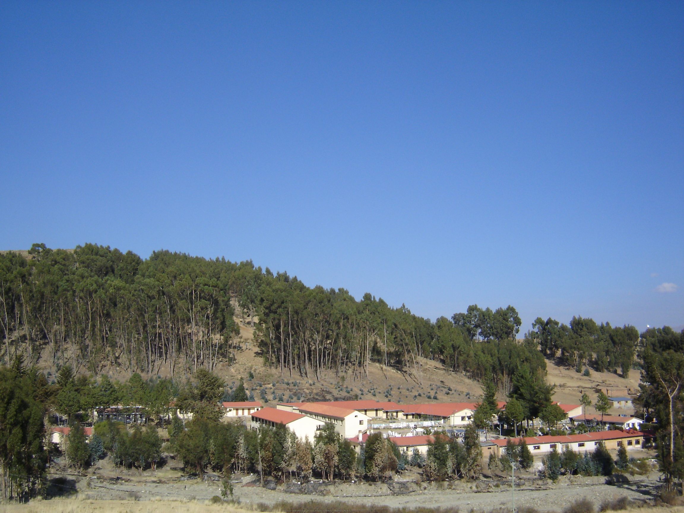 Runa Simi: Wallpama yachaywasi yachachipkuna chantakunankupaq, Challwamayu markapi, Wak'as sapsipi, Wuliwya suyu.